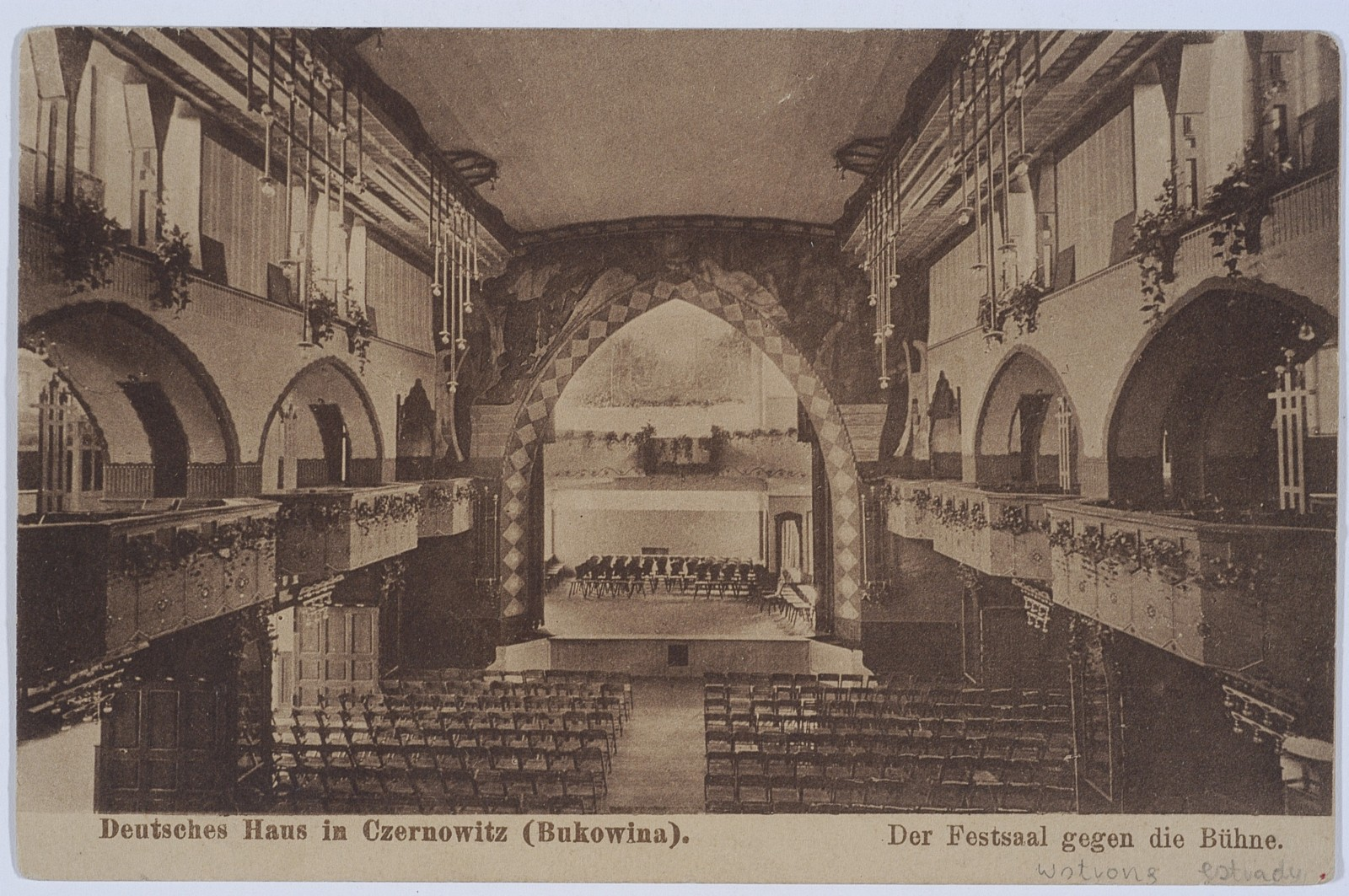 Der Festsaal gegendie Bühne (Deutsches Haus, Czernowitz)